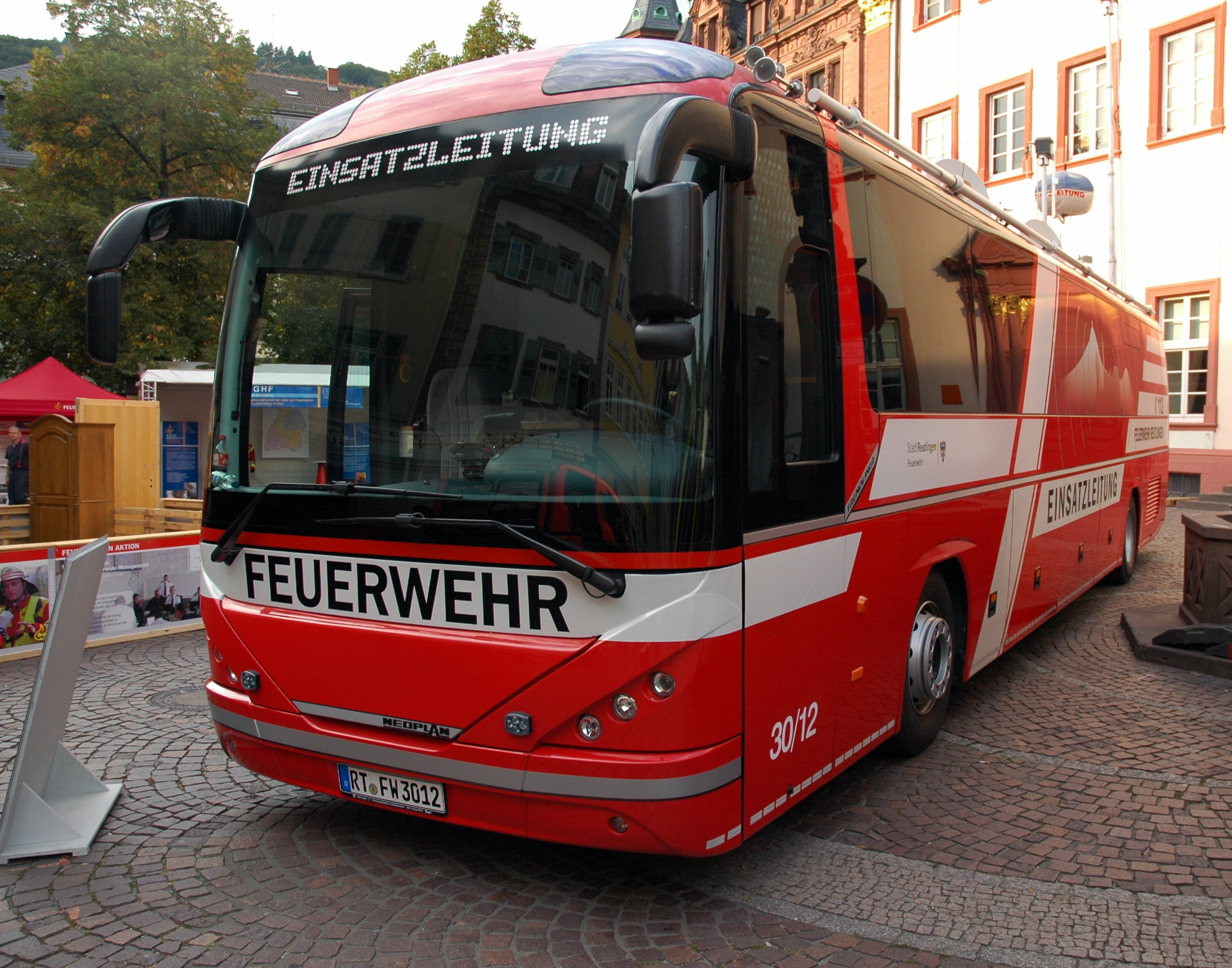 Heidelberg - Feurewehr Reutlingen - Neoplan Trendliner D20 Common Rail - Ziegler - RT-FW 3012 - 2018-07-20 19-40-17